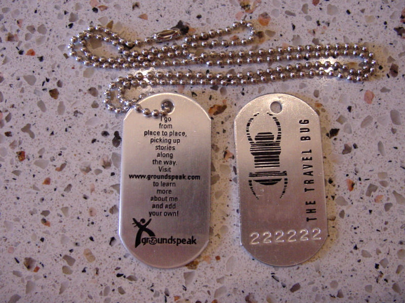 A Travel Bug Tag